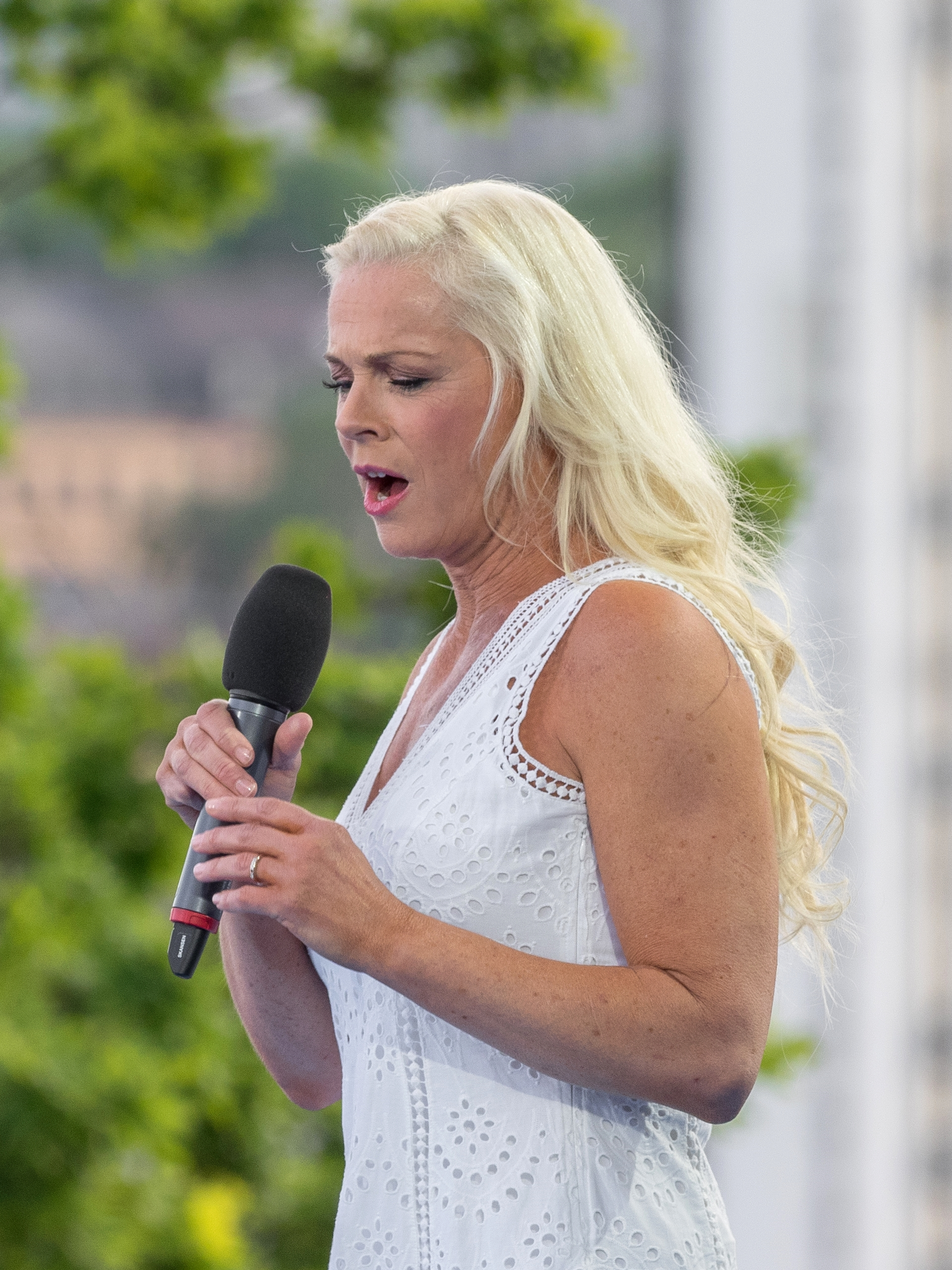 Sveriges Nationaldag 2016